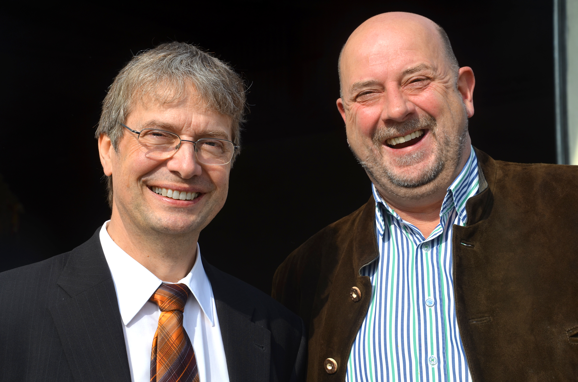 Gute Laune (von links): Pastor Gerald Flade und Ortsbürgermeister Ralf Burmeister am Sonntag, den 4. Oktober 2015 beim Erntedankfest auf dem Hof Auf dem Sichter in Eldagsen ...